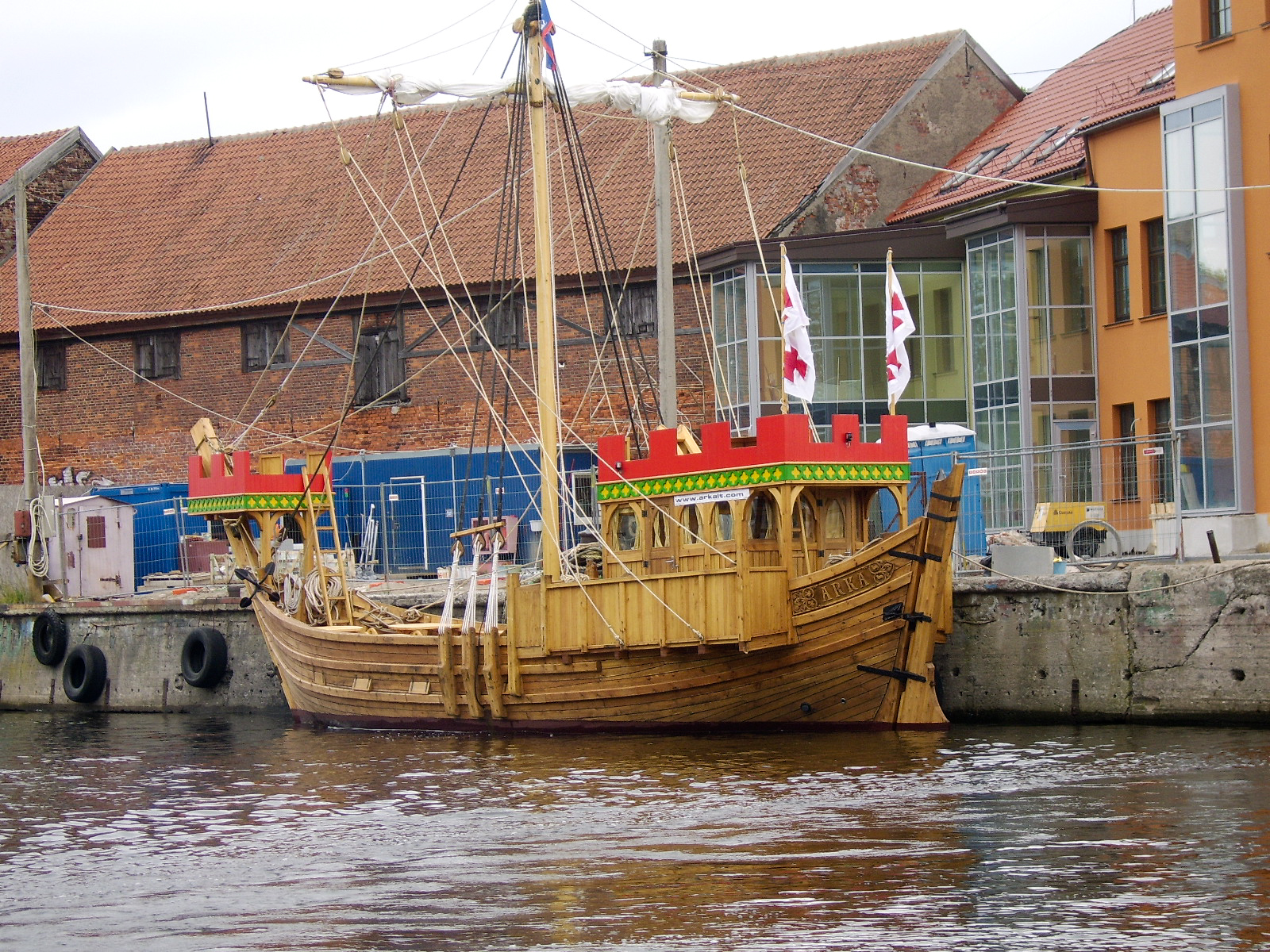 Klaipeda